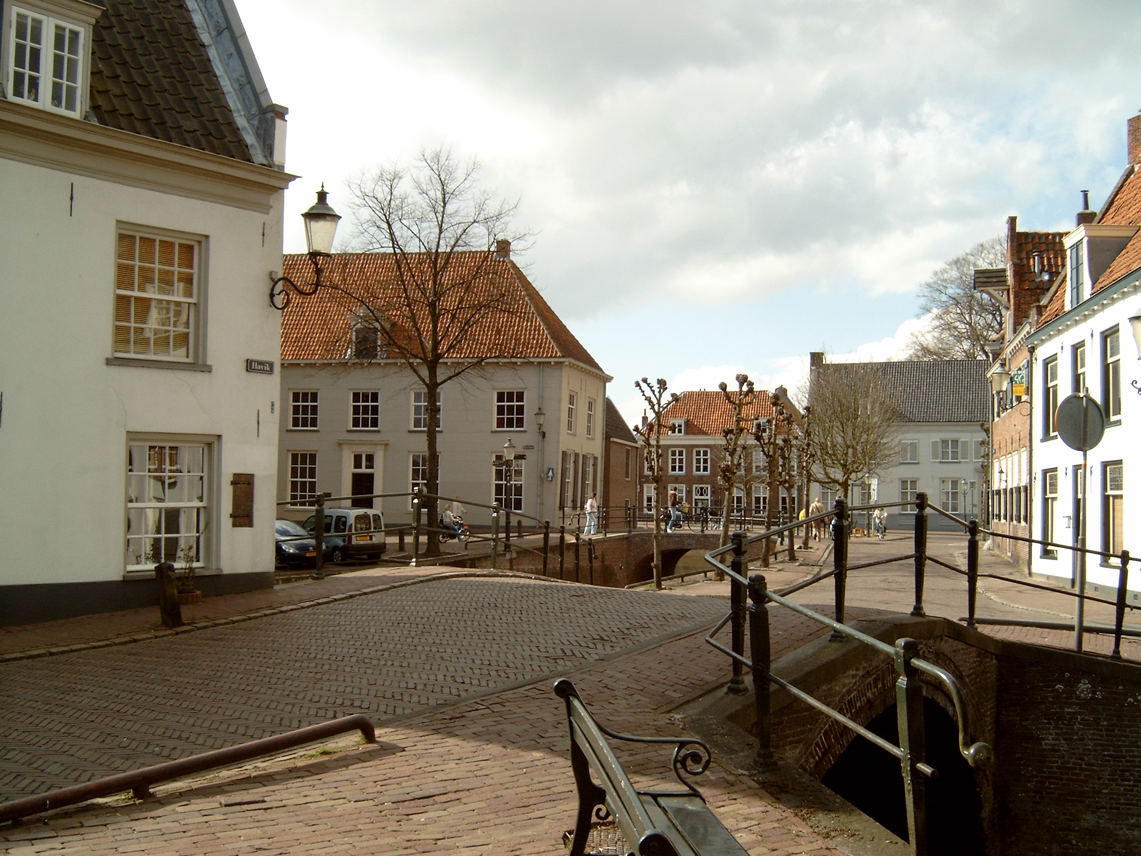 Amersfoort, westzijde Havik, blik richting 't Zand